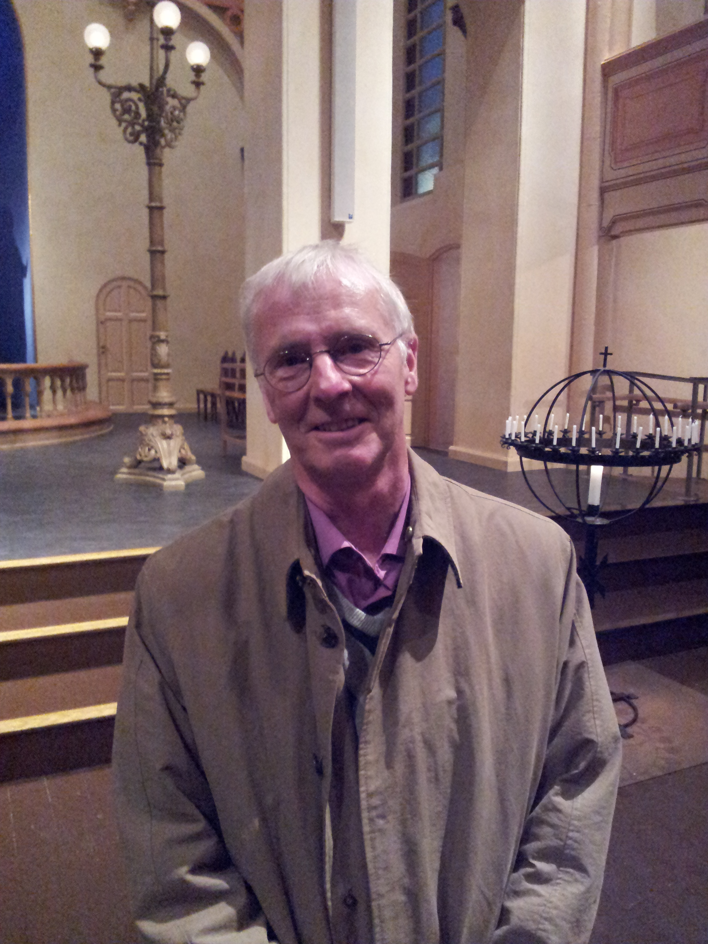 Komponist og kirkemusiker Kjell Mørk Karlsen